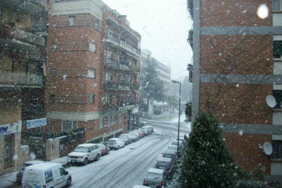 inverno 2012 quartiere gemelli